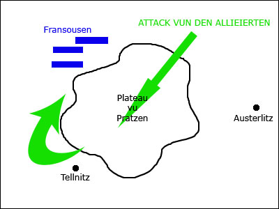 Schluecht vun Austerlitz - Strategie vun den Alliéierten.